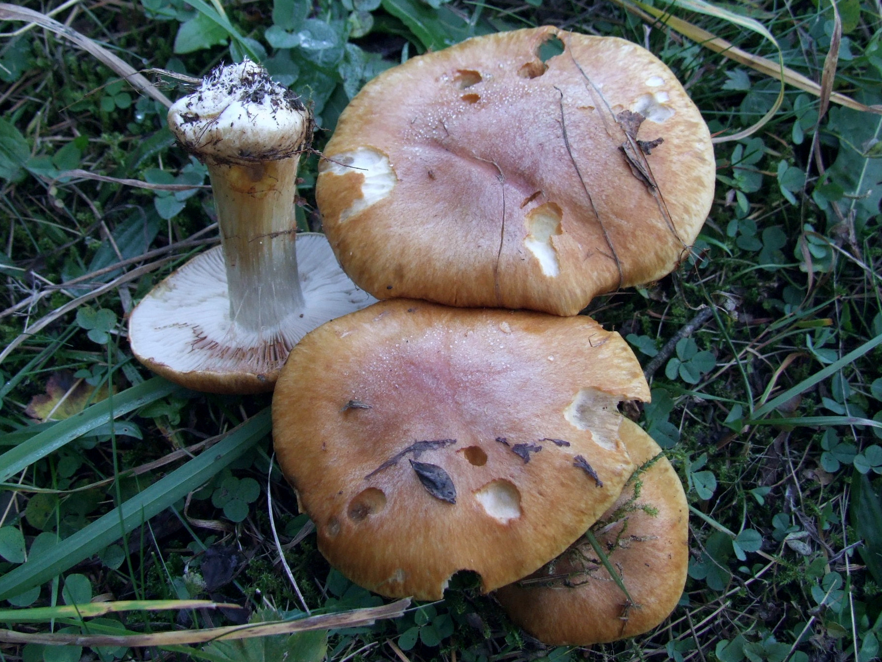 Cortinarius callochlorus